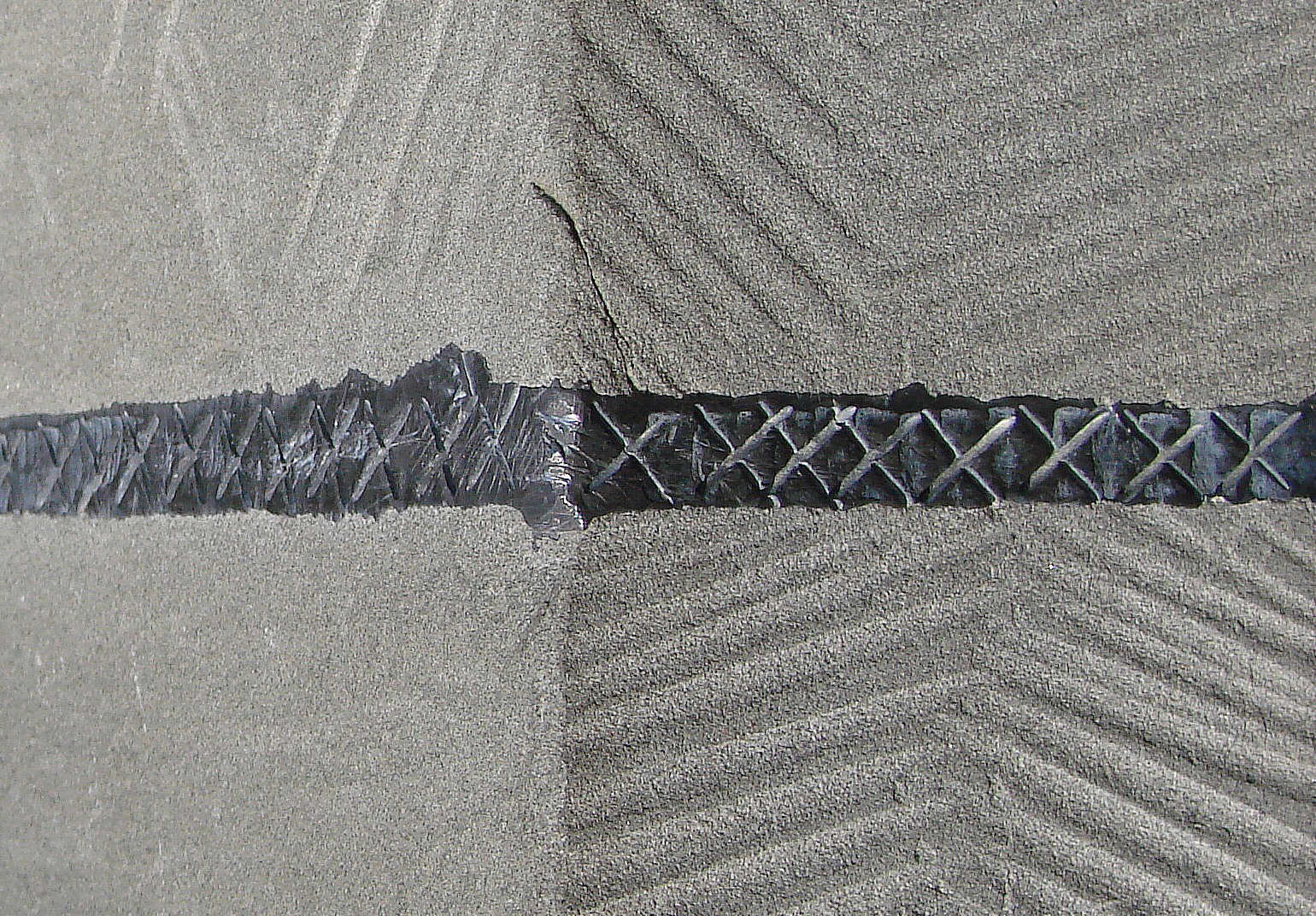 Mit Blei versiegelte Fuge zwischen den Steinen einer Mauer an der Meersburg.